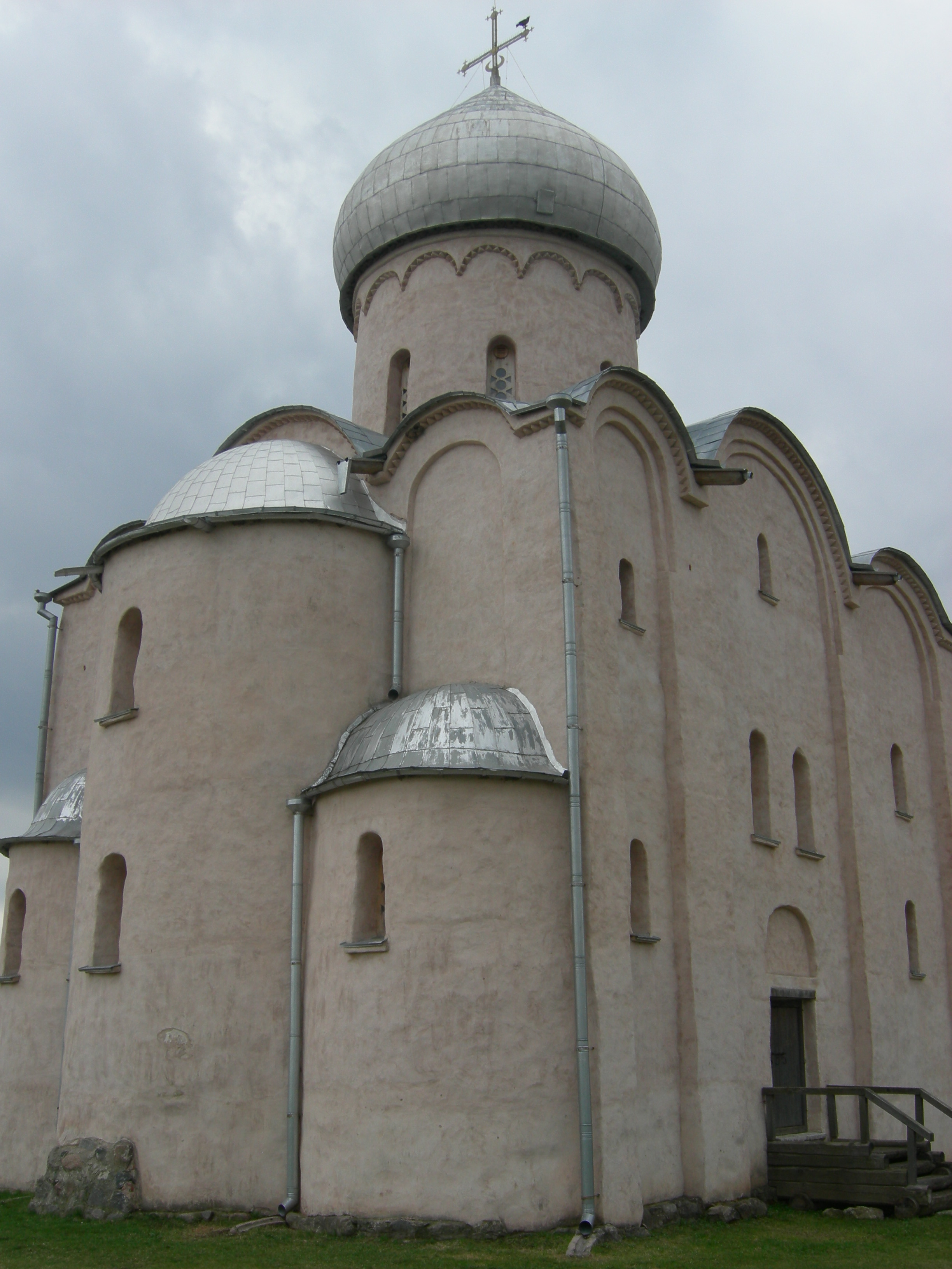 Церковь Спаса на Нередице (Новгородская область, Великий Новгород, деревня Спас-Нередицы)